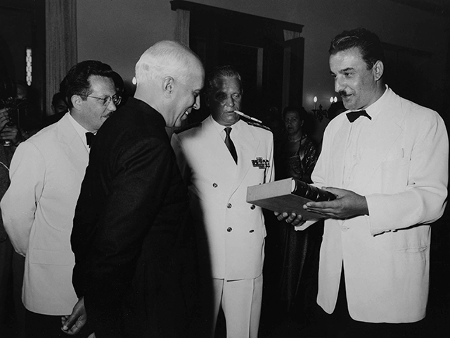 Српски (ћирилица): Посета премијера Индије Џавахарлала Нехруа Југославији: опроштајна вечера у Белој вили (Београд) Инвентарски број: 1955_46_144